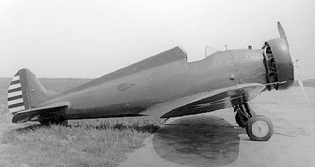 Boeing YP-29A